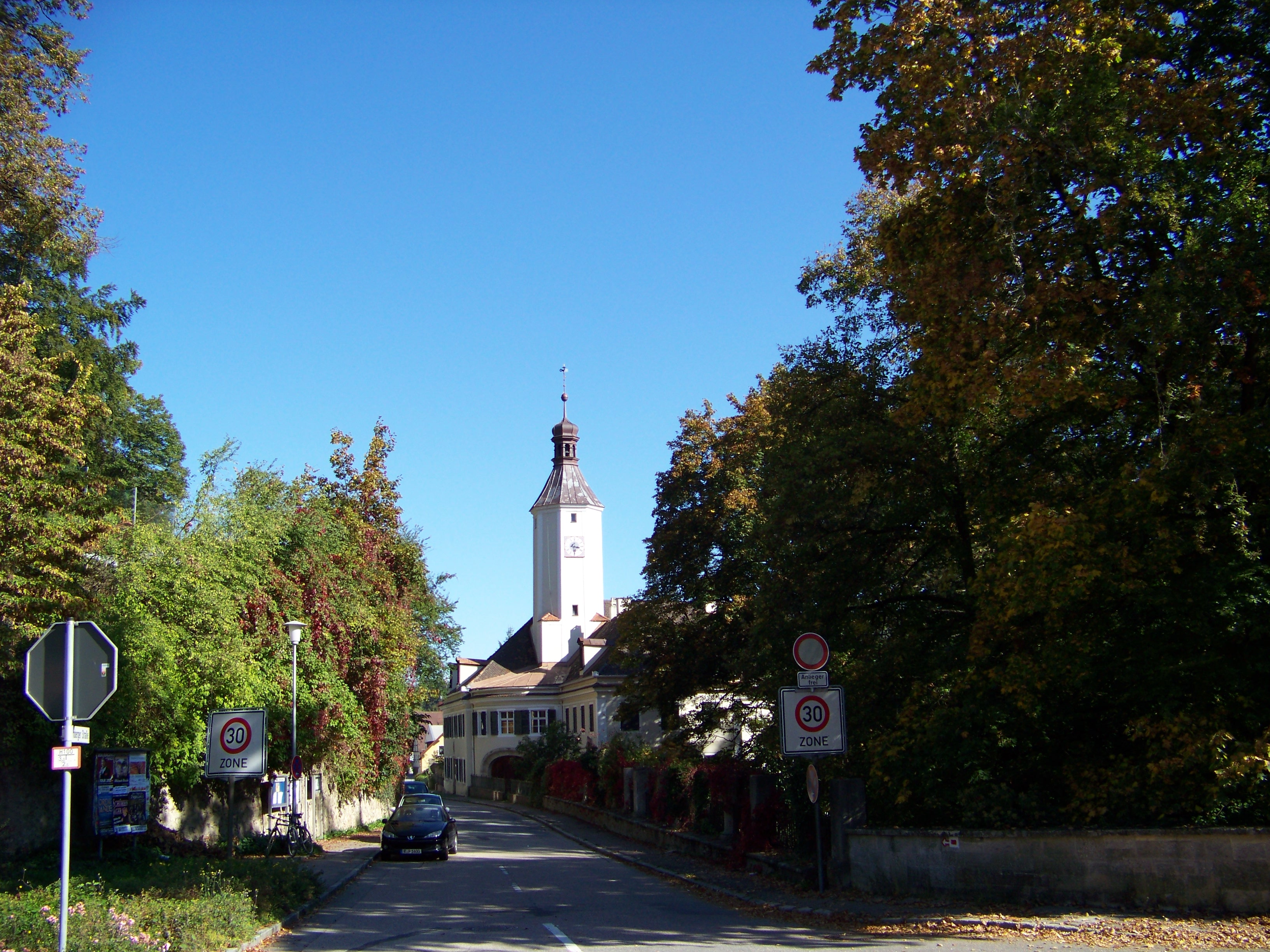 Nittendorf, Etterzhausen, Amberger Straße 6. Ehem. Schloss. Zweigeschossiger, gegliederter Walmdachbau mit Mittelrisalit mit gerundeten Ecken und Kutscheneinfahrt, Turm mit Kuppel, rückseitig Zwerchflügel mit Altane, im Kern 1590, Wiederaufbau nach Dreißigjährigem Krieg, Instandsetzung 1769, Umbau in klassizistischen Formen 1799 wohl durch Joseph Sorg; Landschaftsgarten mit Resten von Möblierung, Einfriedung mit Pfosten und Gusseisenzaun, und Gartenmauer, 18./19. Jahrhundert, mit Inschriftstein, bez. 1696; zugehöriger Keller im Hang gegenüber, 18./19. Jahrhundert oder älter.